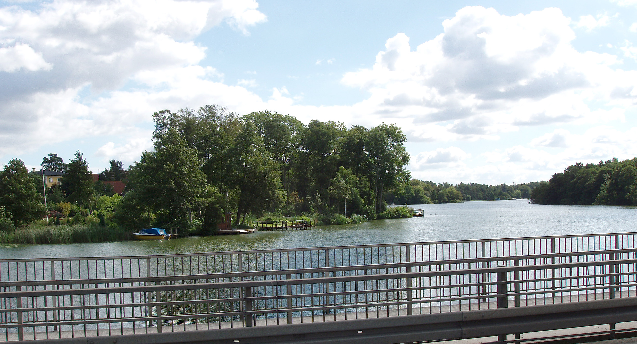 Rye Mølle Sø , Ry, Skanderborg Kommune